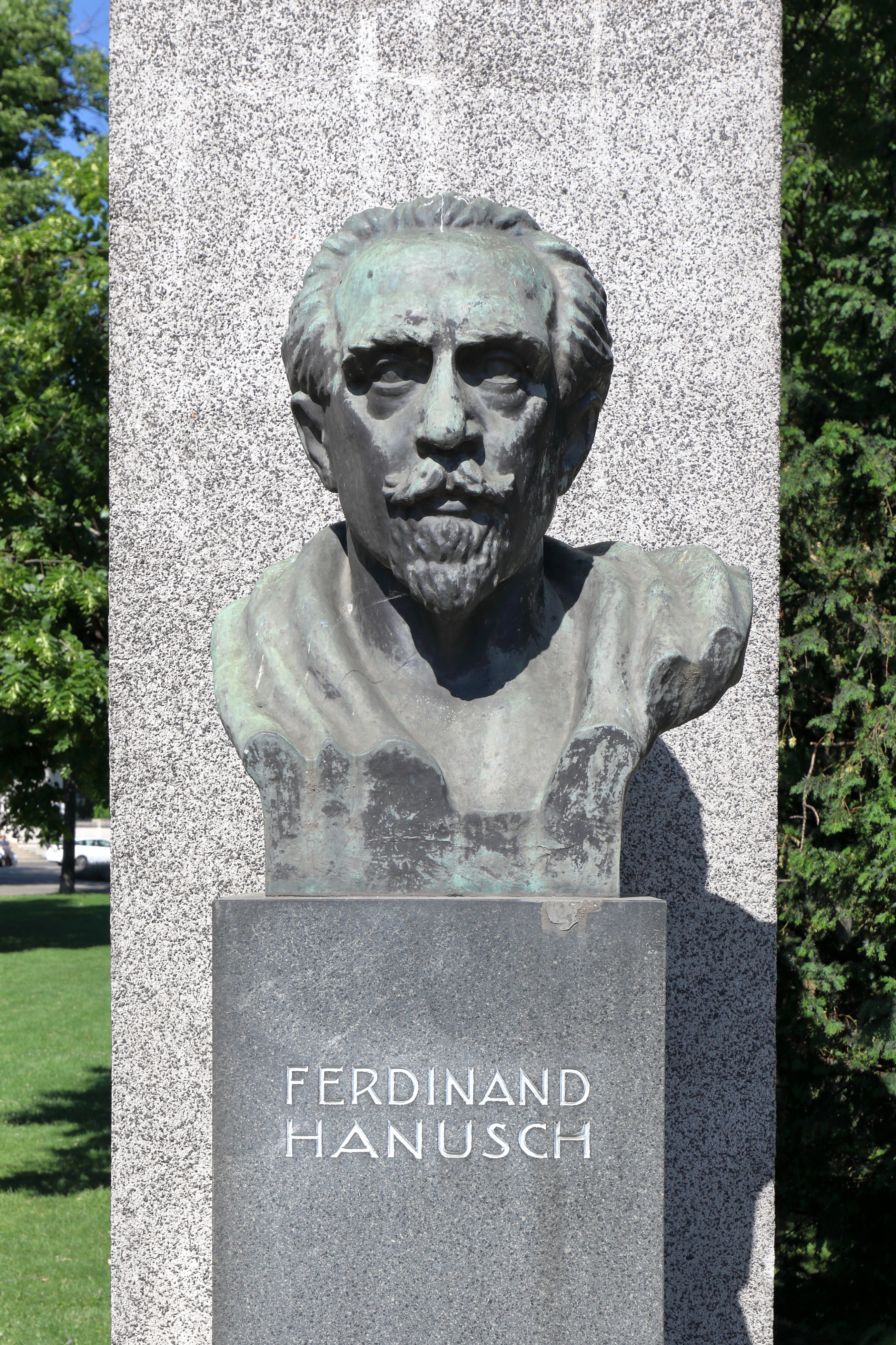 Die Büste Ferdinand Hanusch am Dr.-Karl-Renner-Ring zwischen dem Parlamentsgebäude und Palais Epstein im 1. Wiener Gemeindebezirk Innere Stadt.Die ursprüngliche Büste wurde von dem Bildhauer Carl Wollek gefertigt und war ein Teil des am 12. November 1928 eingeweihten sozialistischen Denkmals der Republik. Die jetzige Büste ist ein Nachguss und wurde von dem Bildhauer Mario Petrucci angefertigt.